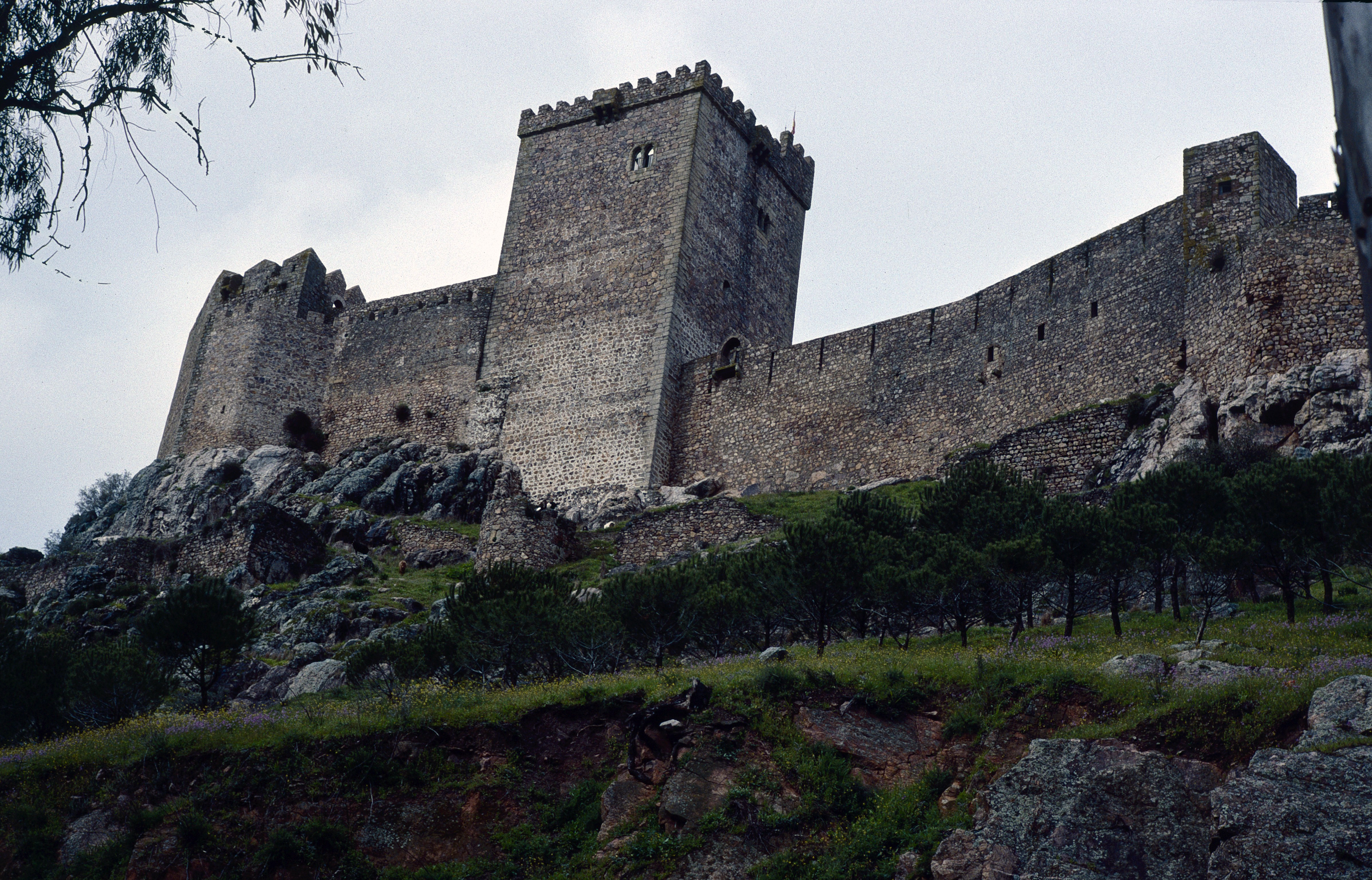 Alburquerque